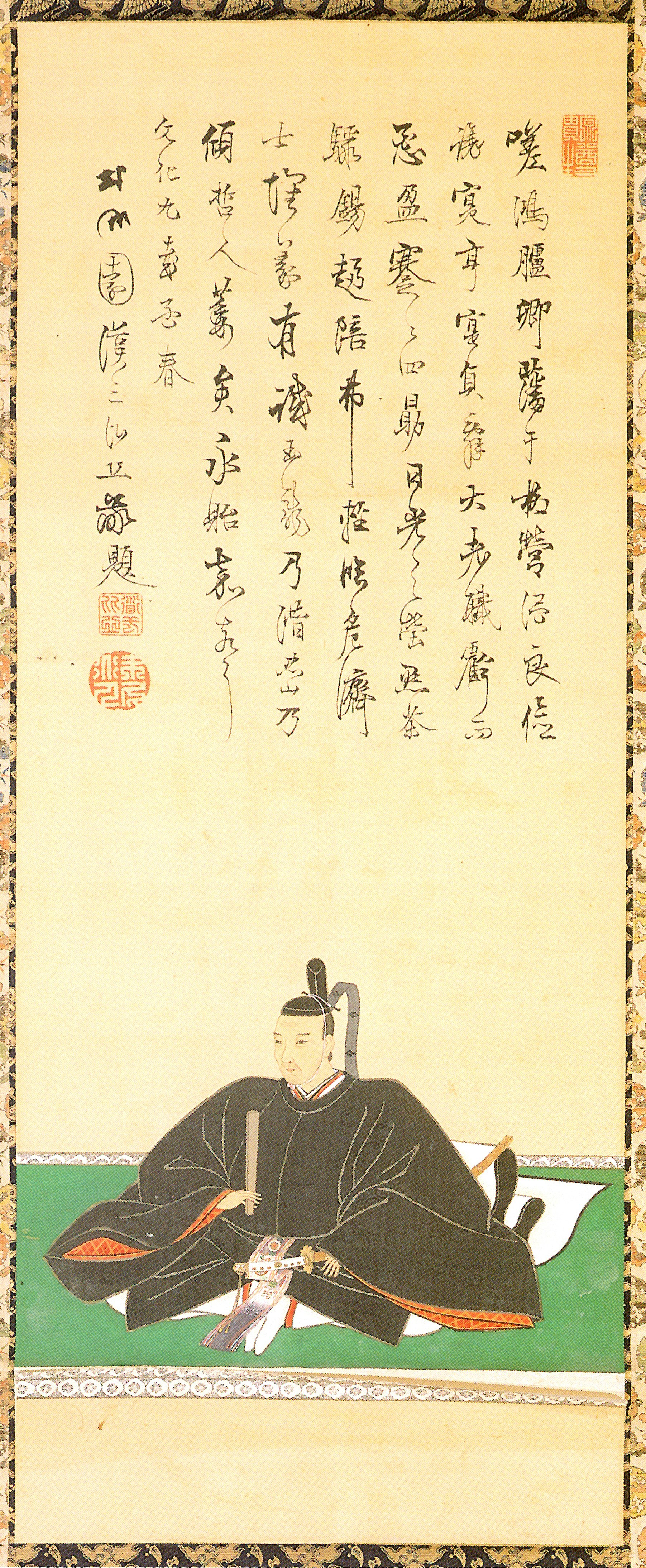 井伊直澄の肖像。